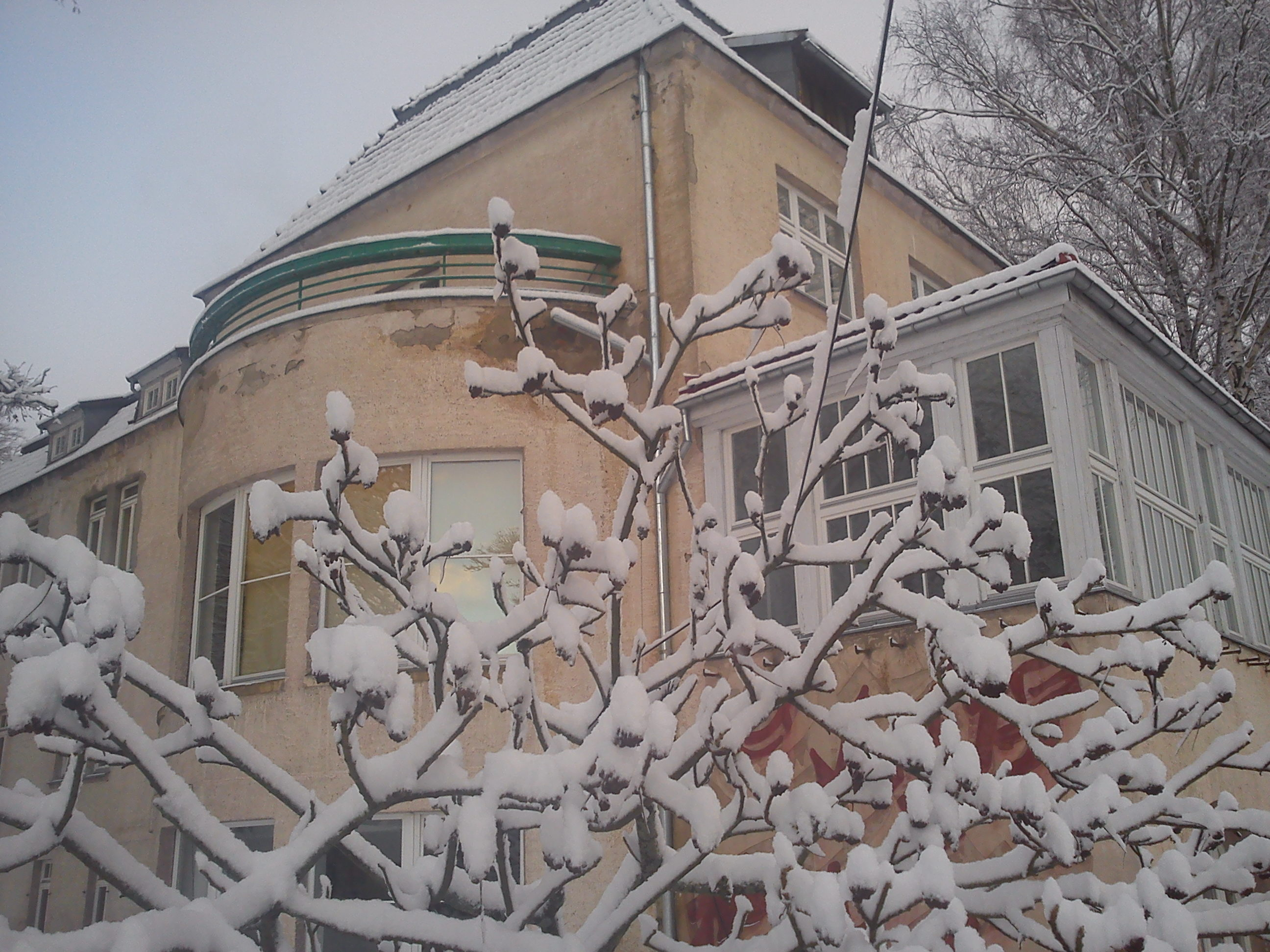 Sanatorium Borkowo zimą